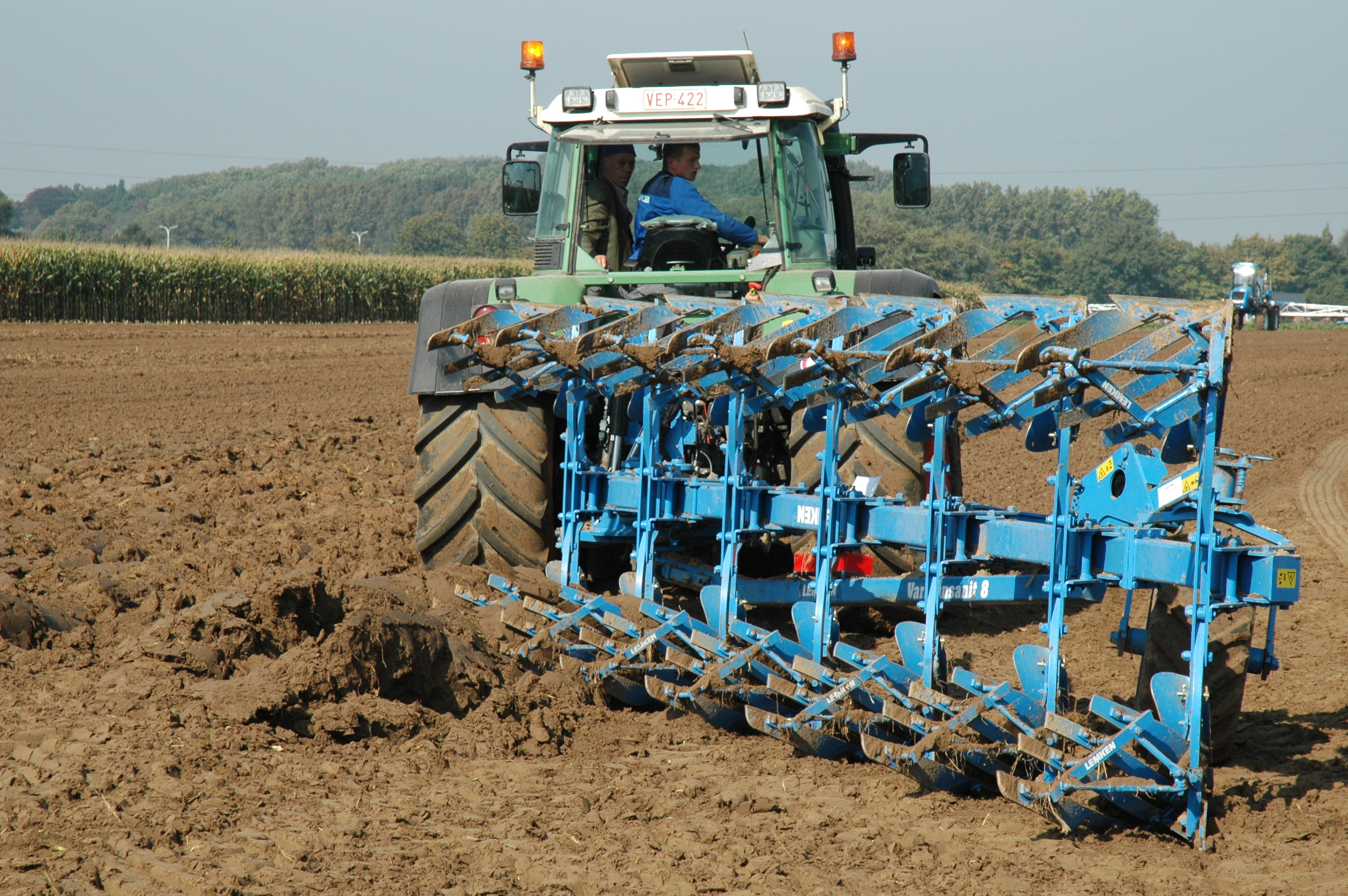 Lemken-Hybridpflug VariTansanit 8, Werktuigendagen 2007